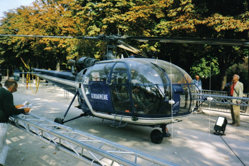 Ancienne Alouette de Gendarmerie au Champs d'Aviation en septembre 1998